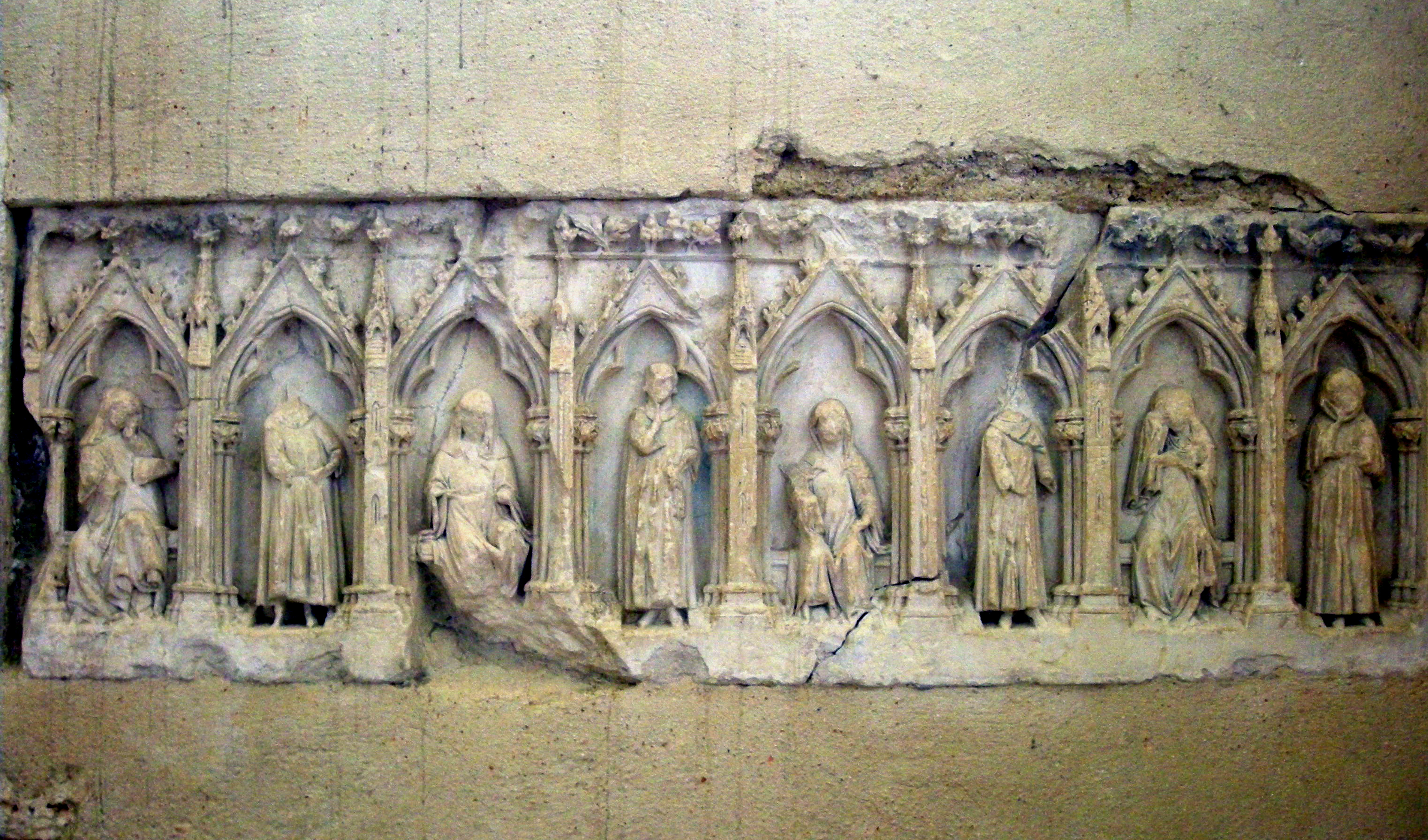 Abbaye de Lessay (département de la Manche)